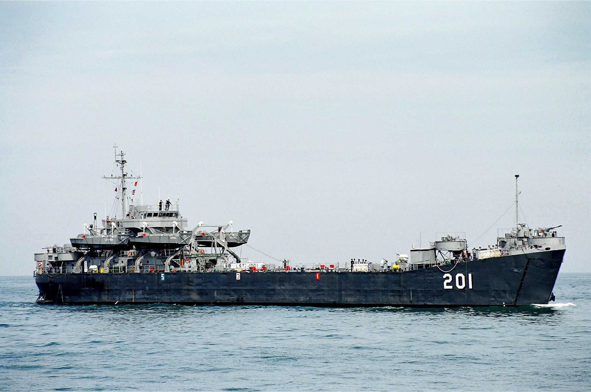 中華民國海軍的中海號(LST-201)戰車登陸艦